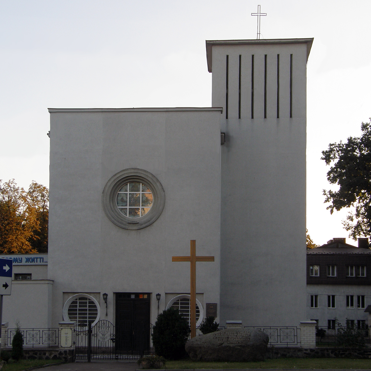 костёл Петра и Павла